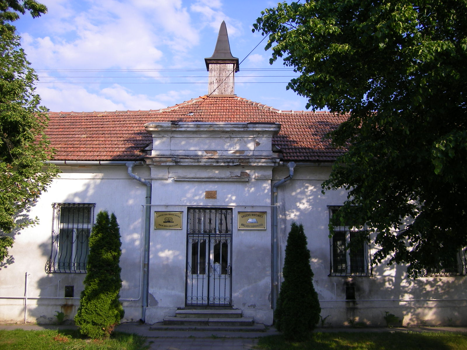 Szímő - községi könyvtár